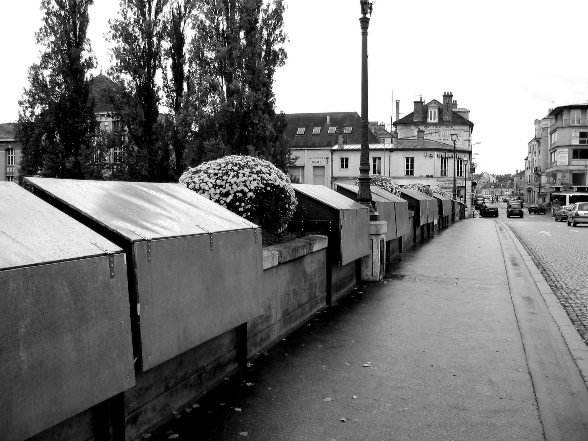 Le pont Jeanne d'Arc à Melun, reliant l'ile Saint Etienne au quartier Saint Aspais. On voit les étals(fermés ici) où les libraires exposent leurs livres pour les vendre(comme à Paris).